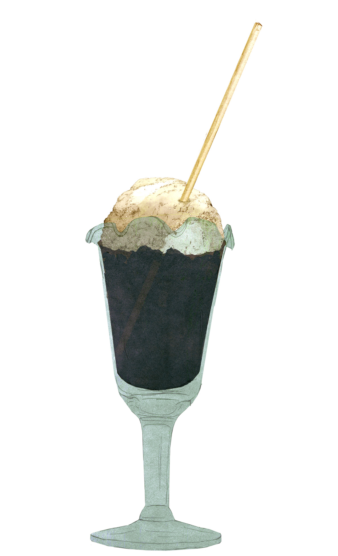 Imatges realitzades pel Museu Valencià d'Etnologia (Andrés Marín Jarque) per al Museu Comarcal de la Vall d'Albaida (Benissoda).